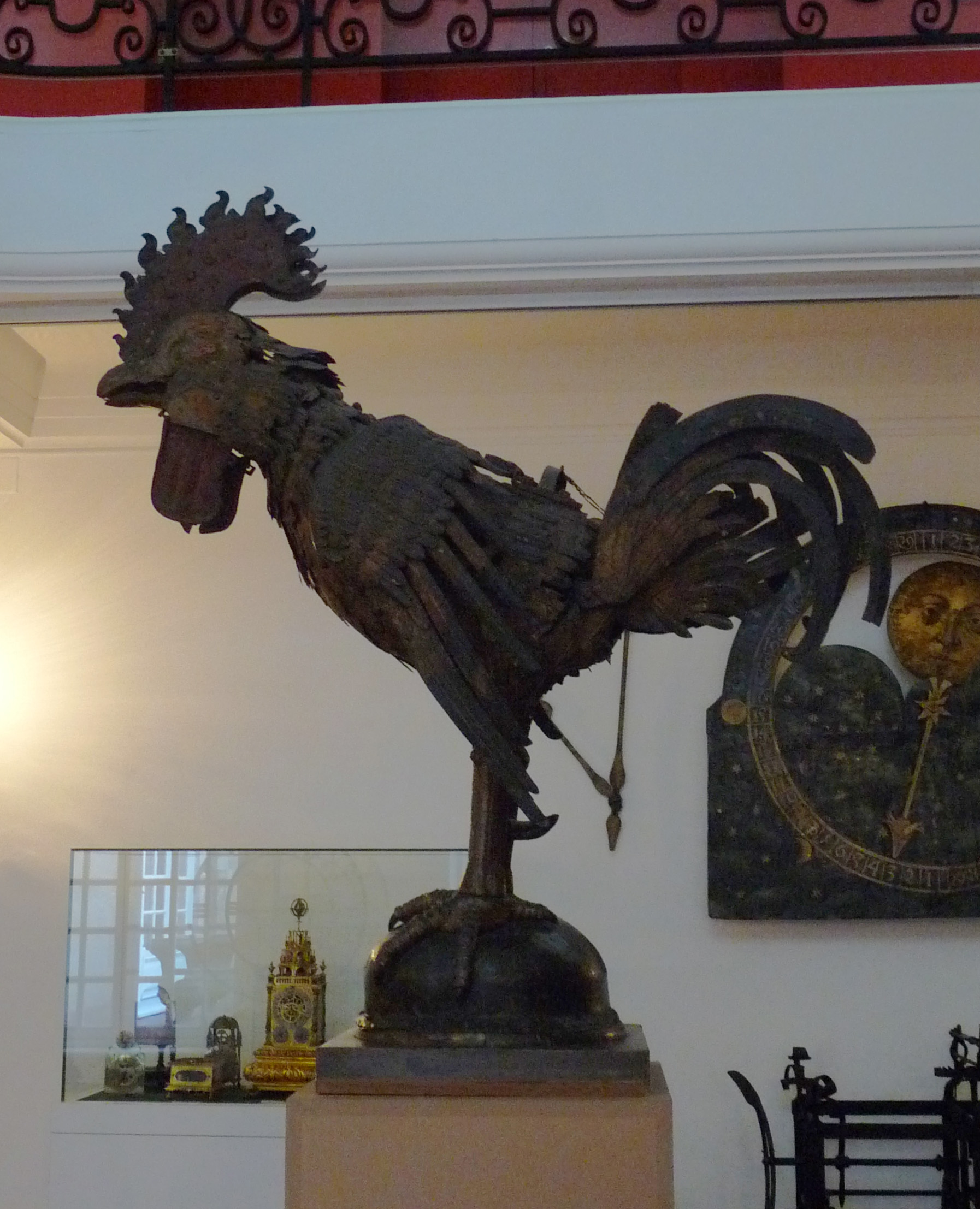 Palais Rohan (Strasbourg). Musée des Arts décoratifs, salle d'horlogerie (n° 14). Coq automate (vers 1350), élément de la première et de la seconde horloge astronomique de la cathédrale de Strasbourg. Bois et fer forgé polychrome. Le plus ancien automate conservé en Occident.